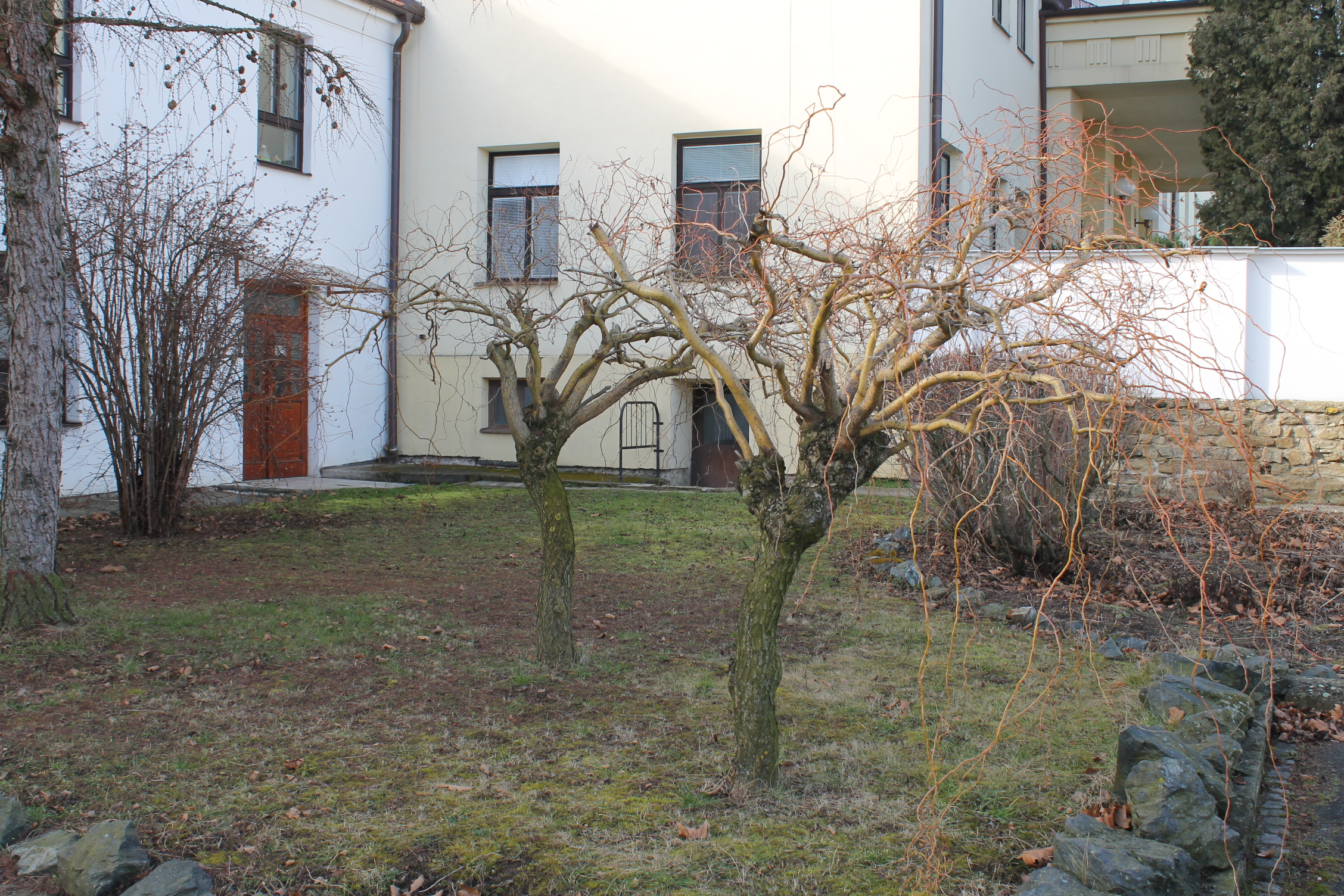 řez, vrba, Rajhrad, Monastery of Sisters of Consolation (Rajhrad)